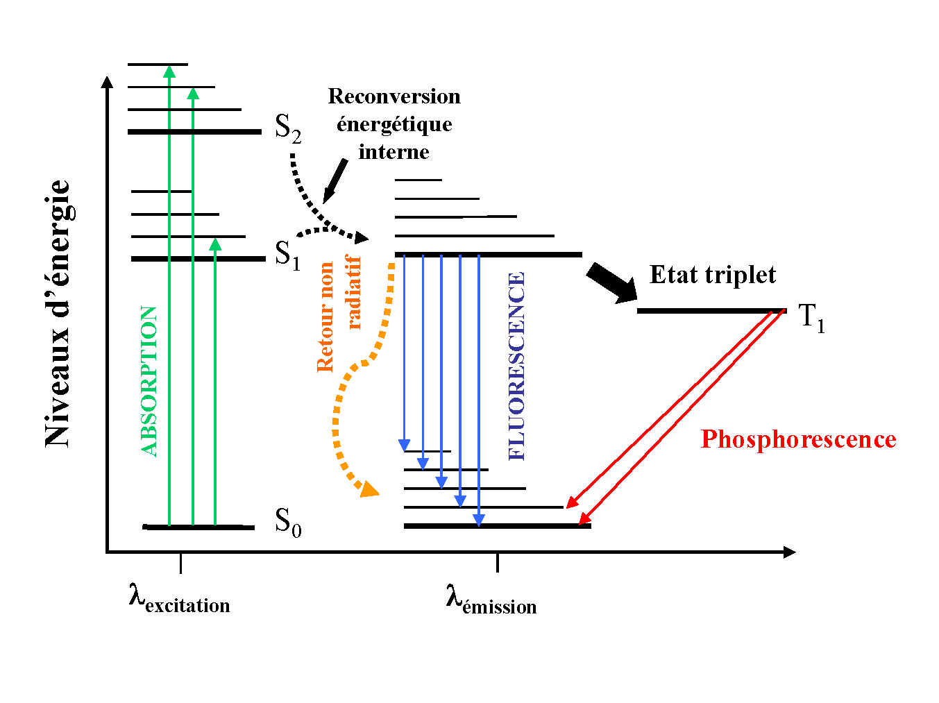 Diagramme de Jablonski